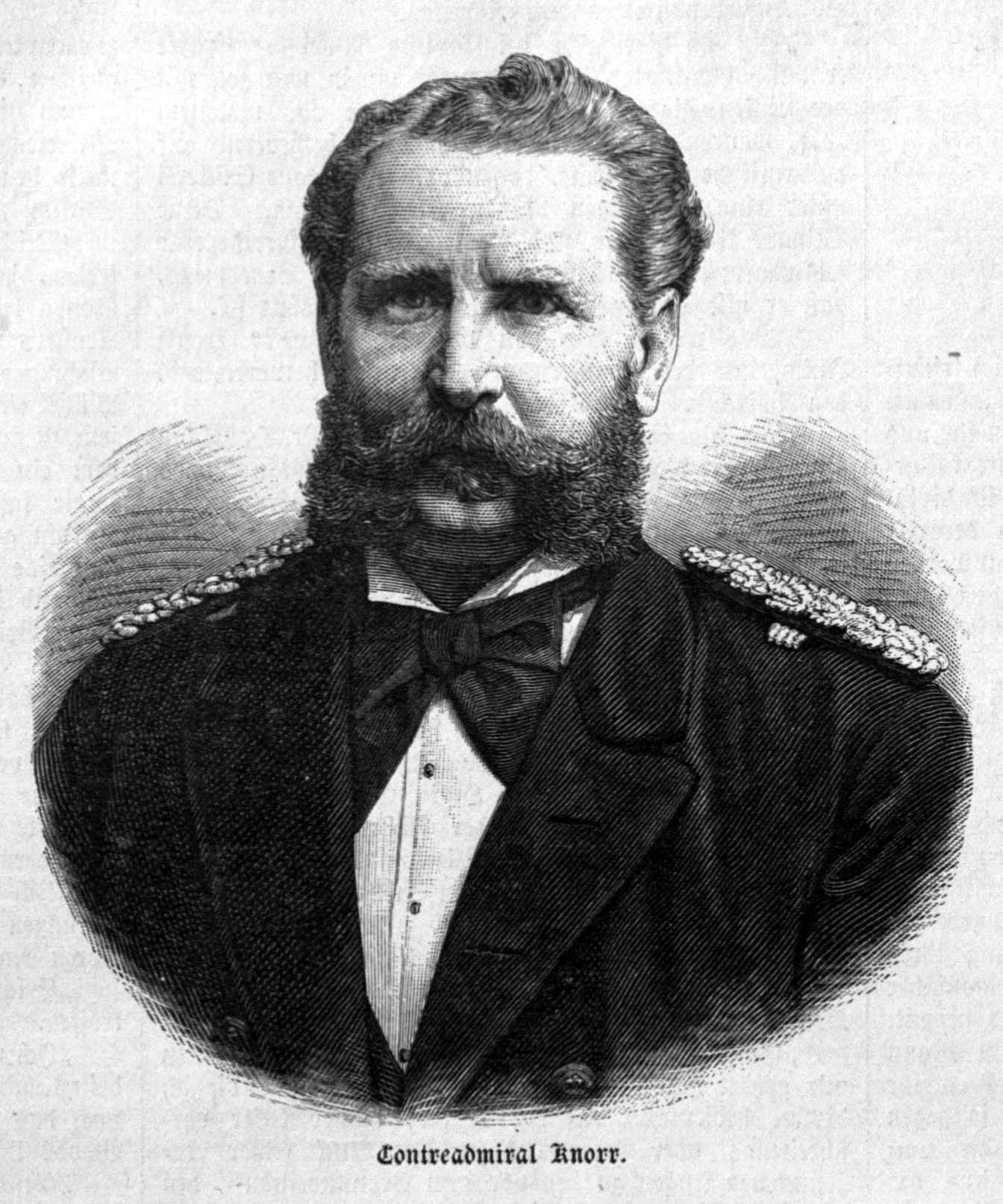 Portrait von Eduard von Knorr (Marineoffizier, Deutsches Reich)